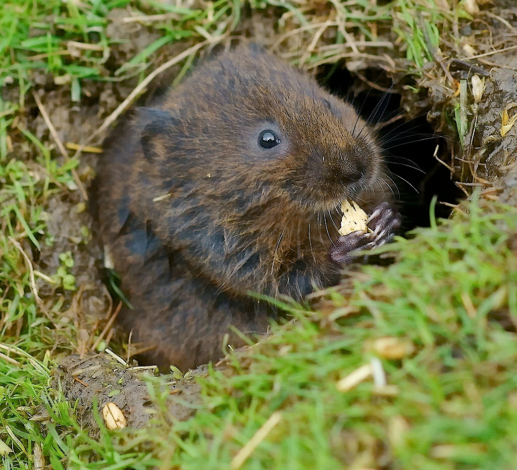 Ostschermaus (Arvicola terrestris), in der Öffnung eines unterirdischen, von Schermäusen gegrabenen Gangs, beim Fressen eines Samenkorns.